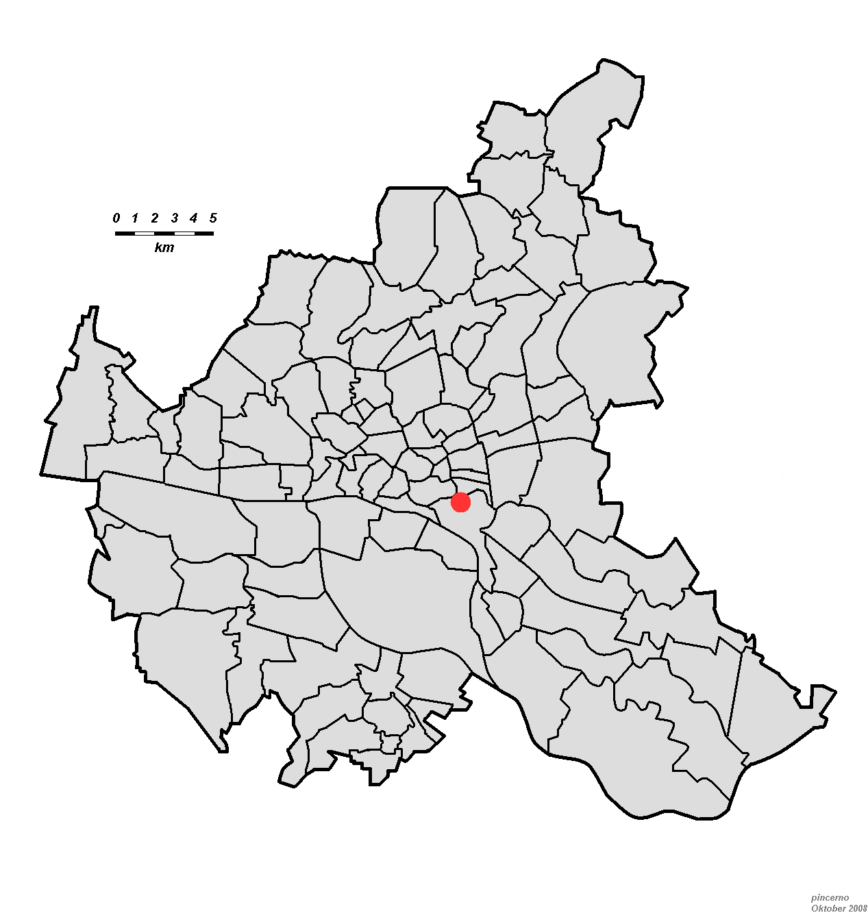 Lage der Schule Bullenhuser Damm (später: Janusz-Korczak-Schule) in Hamburg.